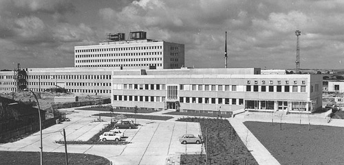 Das Kreisgesundheitszentrum Schwedt im Bau, Ansicht von Nordosten, 1970. Der Gebäudekomplex wurde 1973 fertiggestellt und als Kreiskrankenhaus Schwedt eingeweiht. Im Jahre 1974 erhielt es den Namen "Dr. Salvador Allende" und wurde 1981 zum Bezirkskrankenhaus (BKH). Ab 1991 "Klinikum Uckermark" und ab 2005 "Asklepios Klinikum Uckermark".